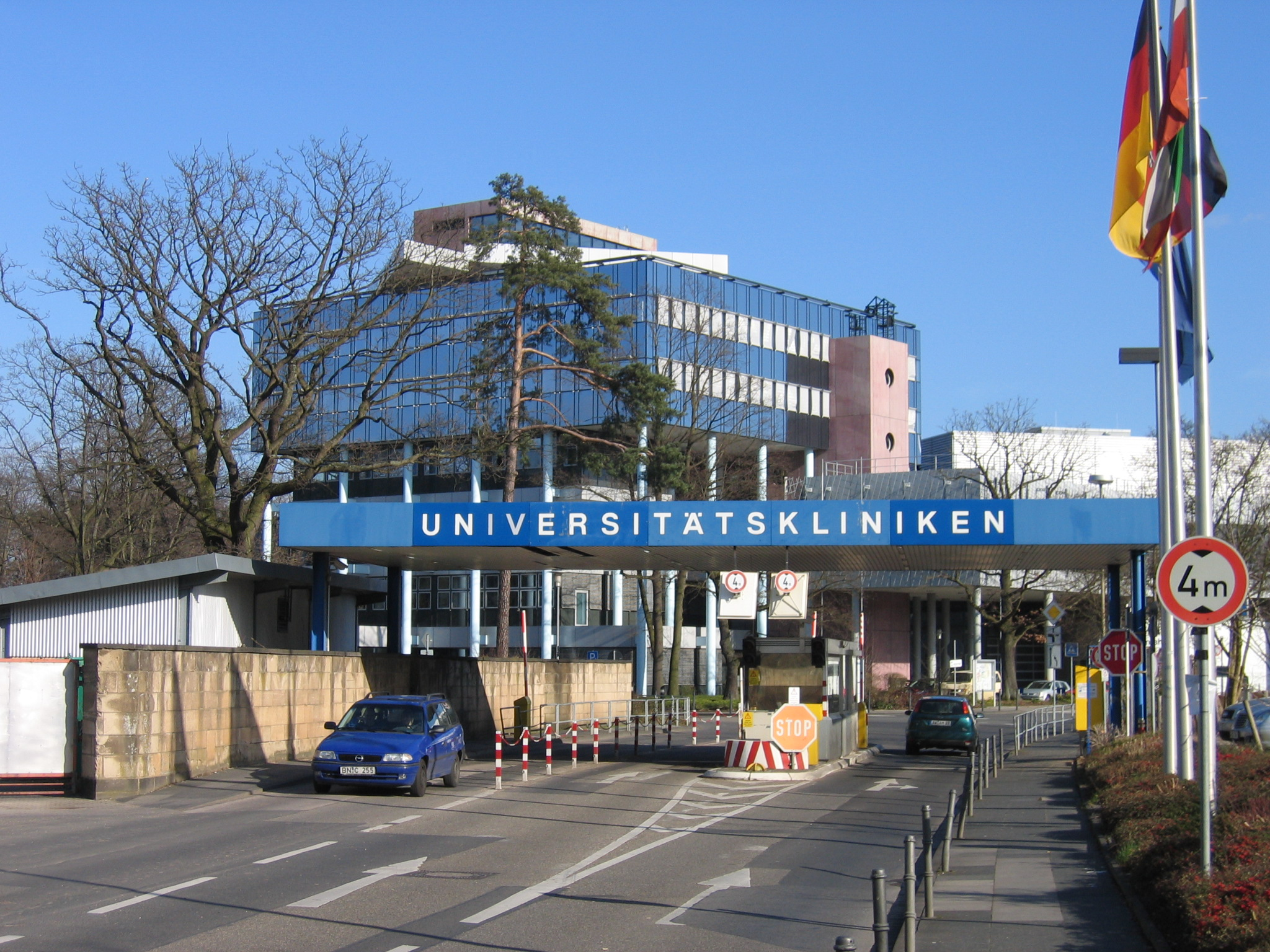 Universitätsklinikum Bonn, Bonn-Venusberg: Eingang an der Sigmund-Freud-Straße